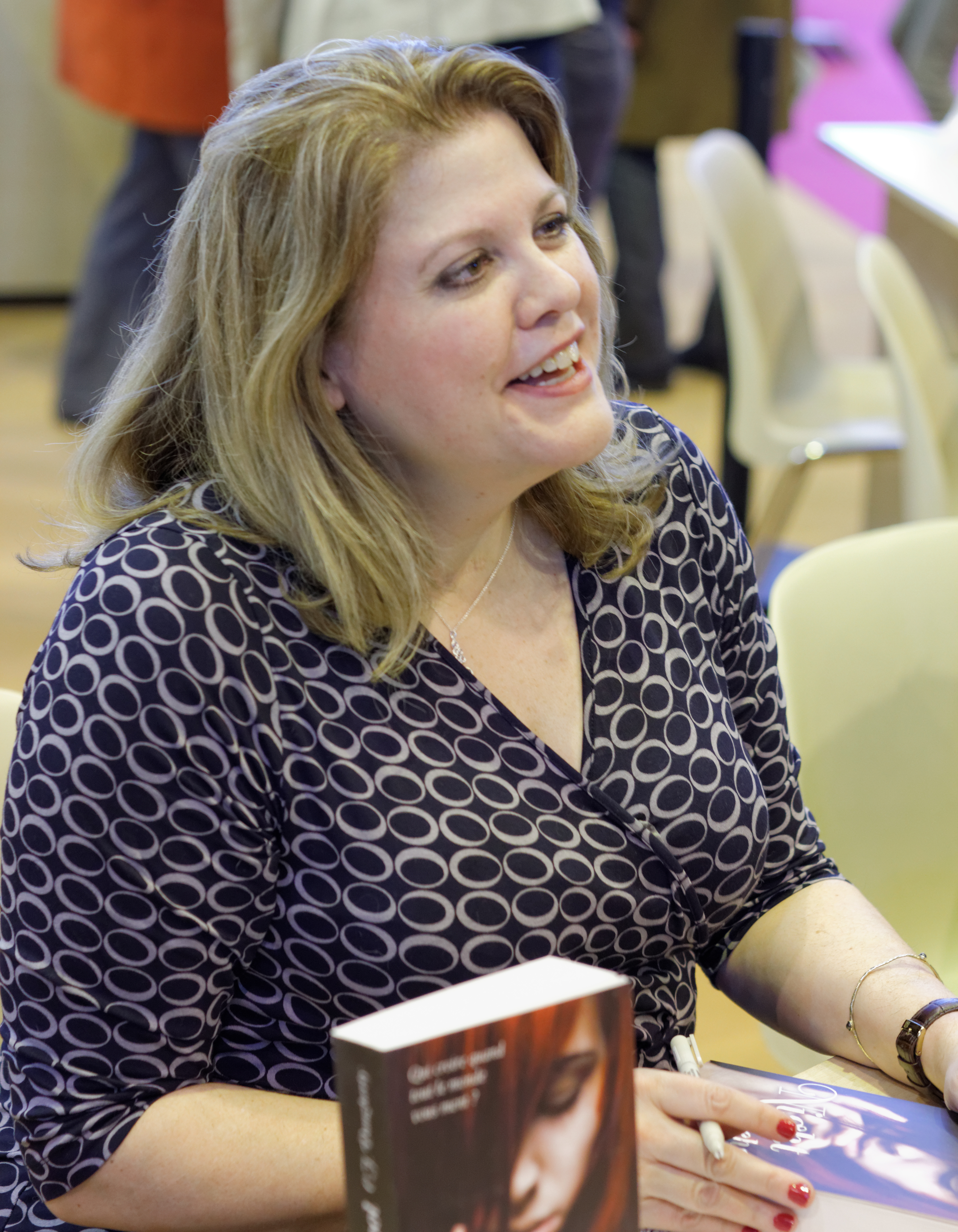 C. J. Daugherty, salon du livre de Paris, 2013